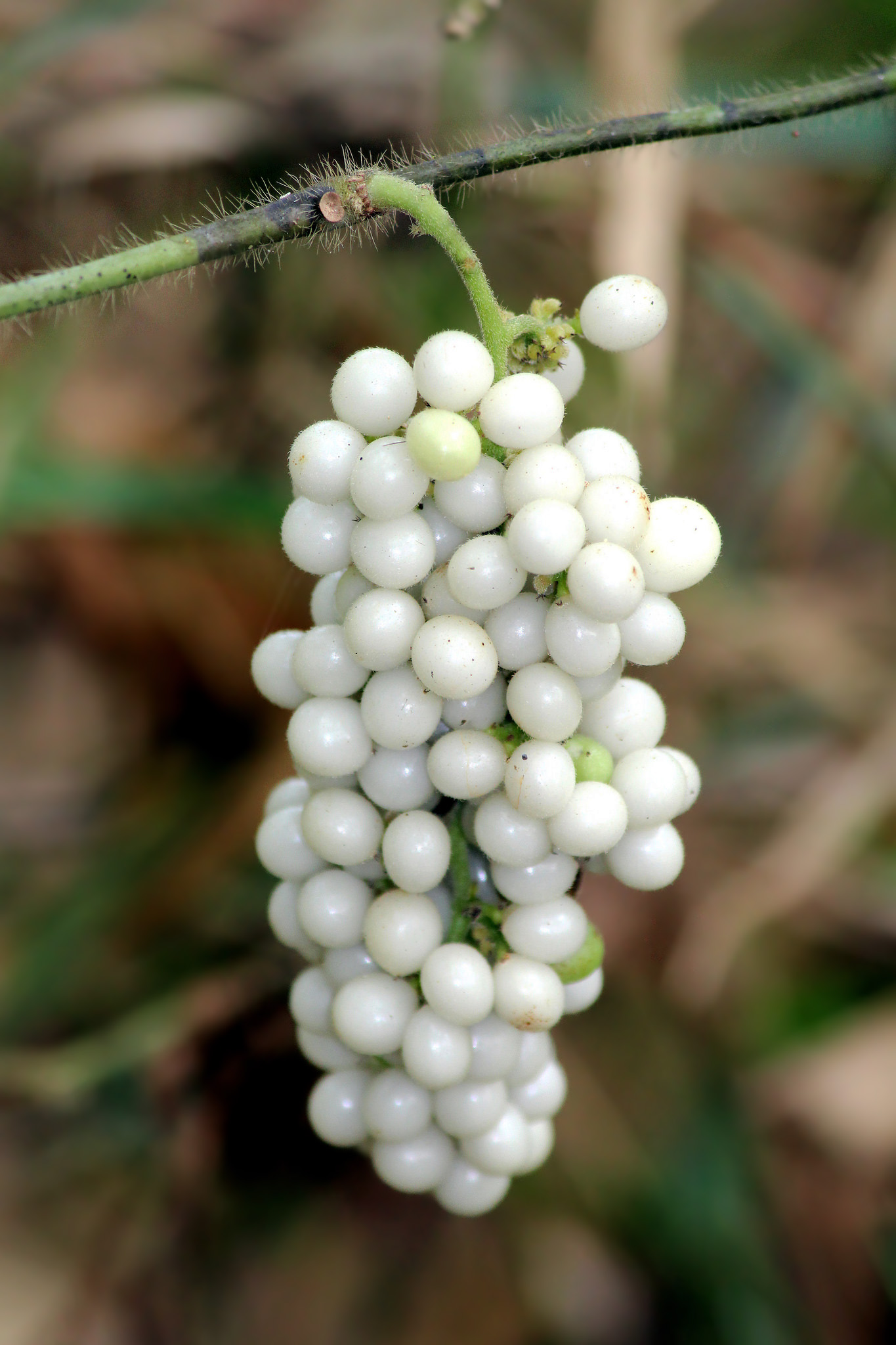 പാടക്കിഴങ്ങ്, പാടത്താളി